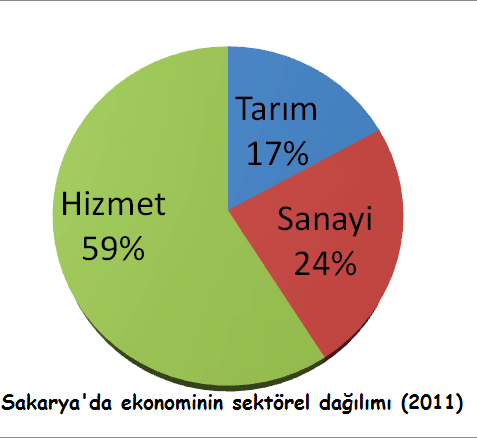 Sakarya'da ekonomik sektörlerin GSMH'ya katkıları.